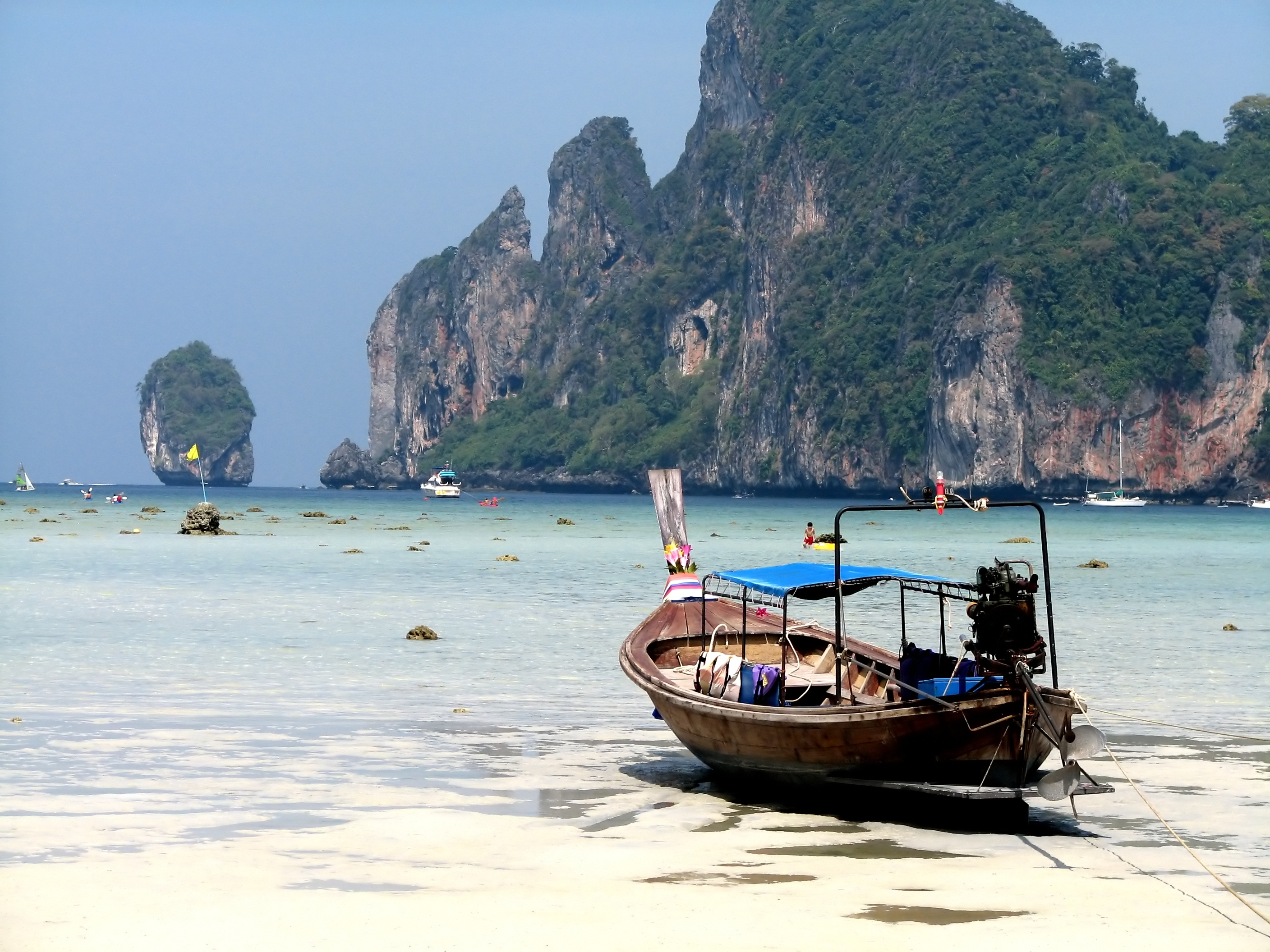 Ko Phi Phi